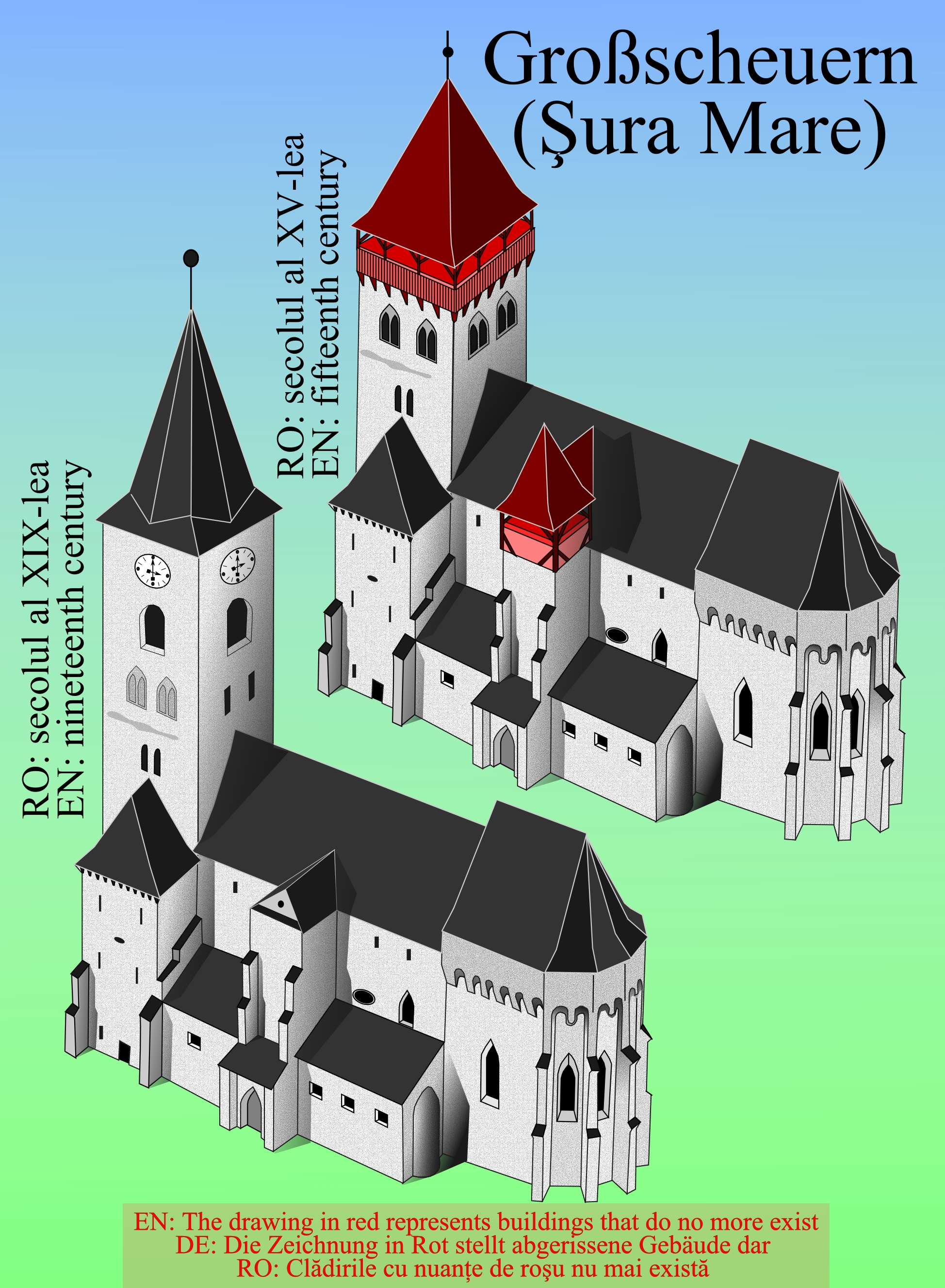 Biserica fortificata din Sura Mare